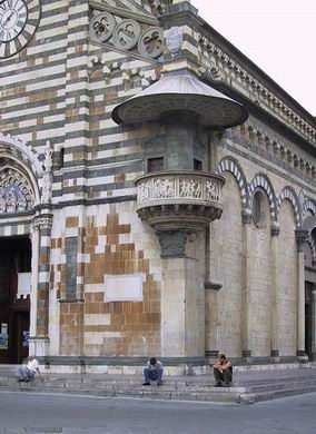 Pulpito di prato